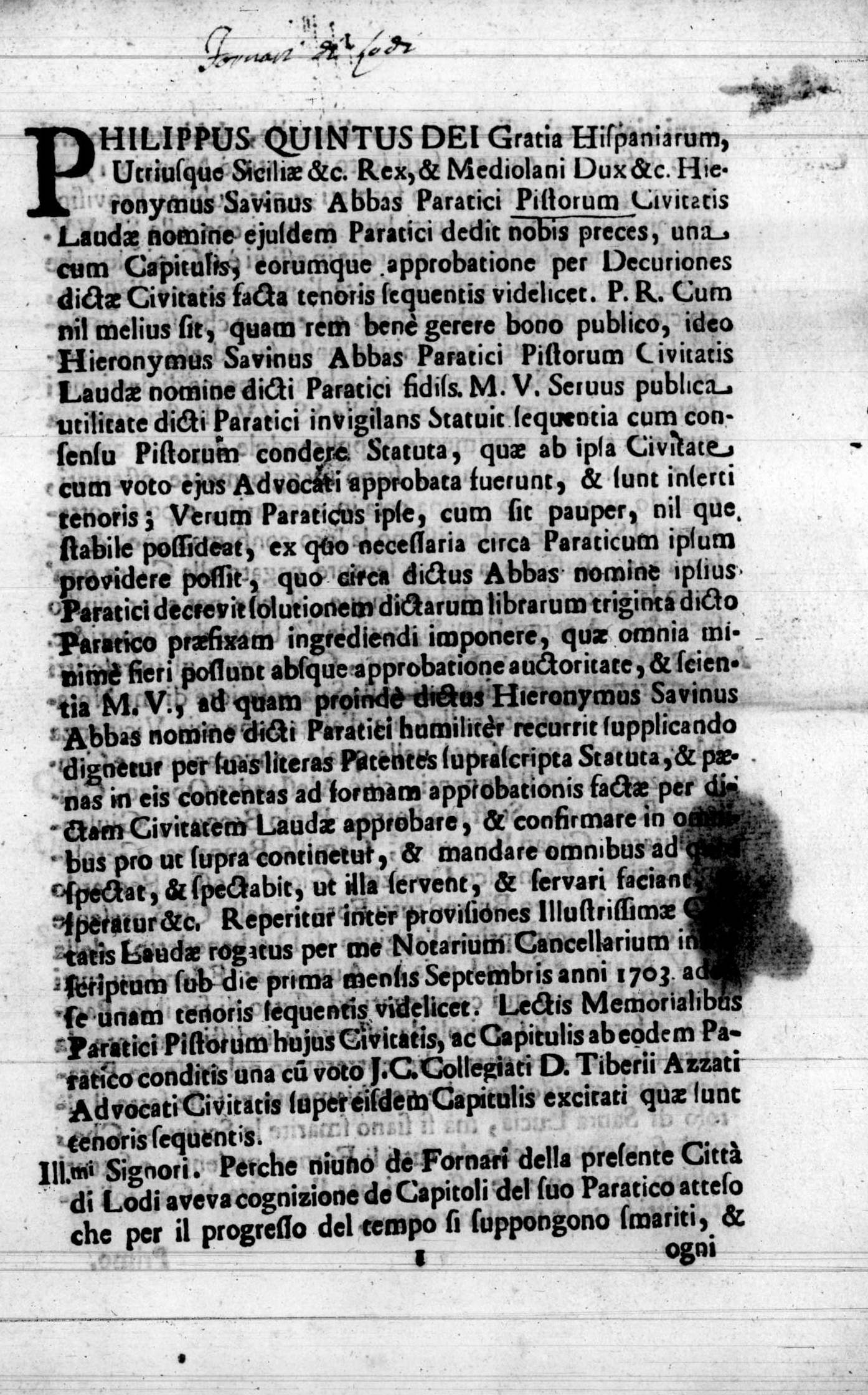 Frontespizio